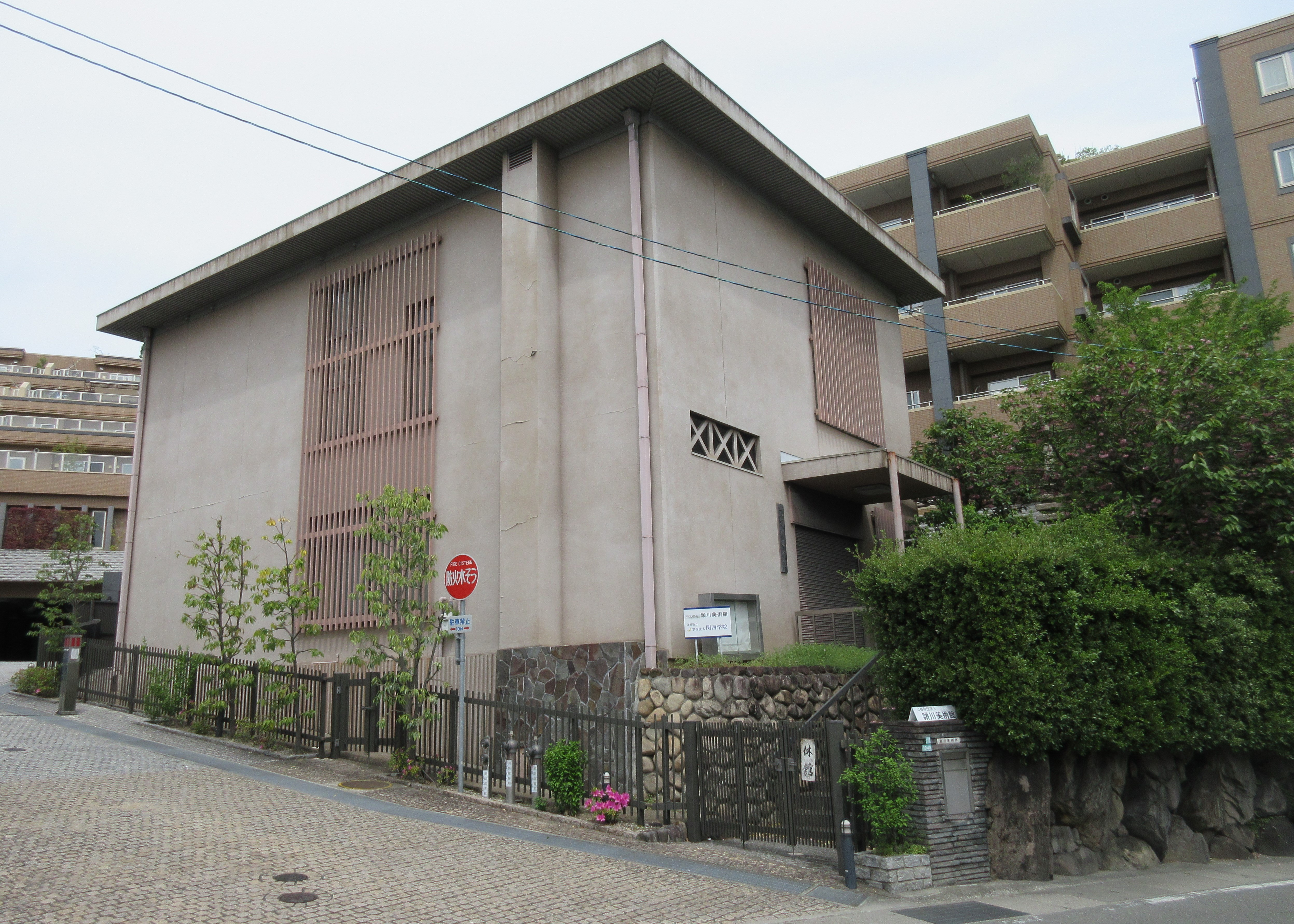 頴川美術館